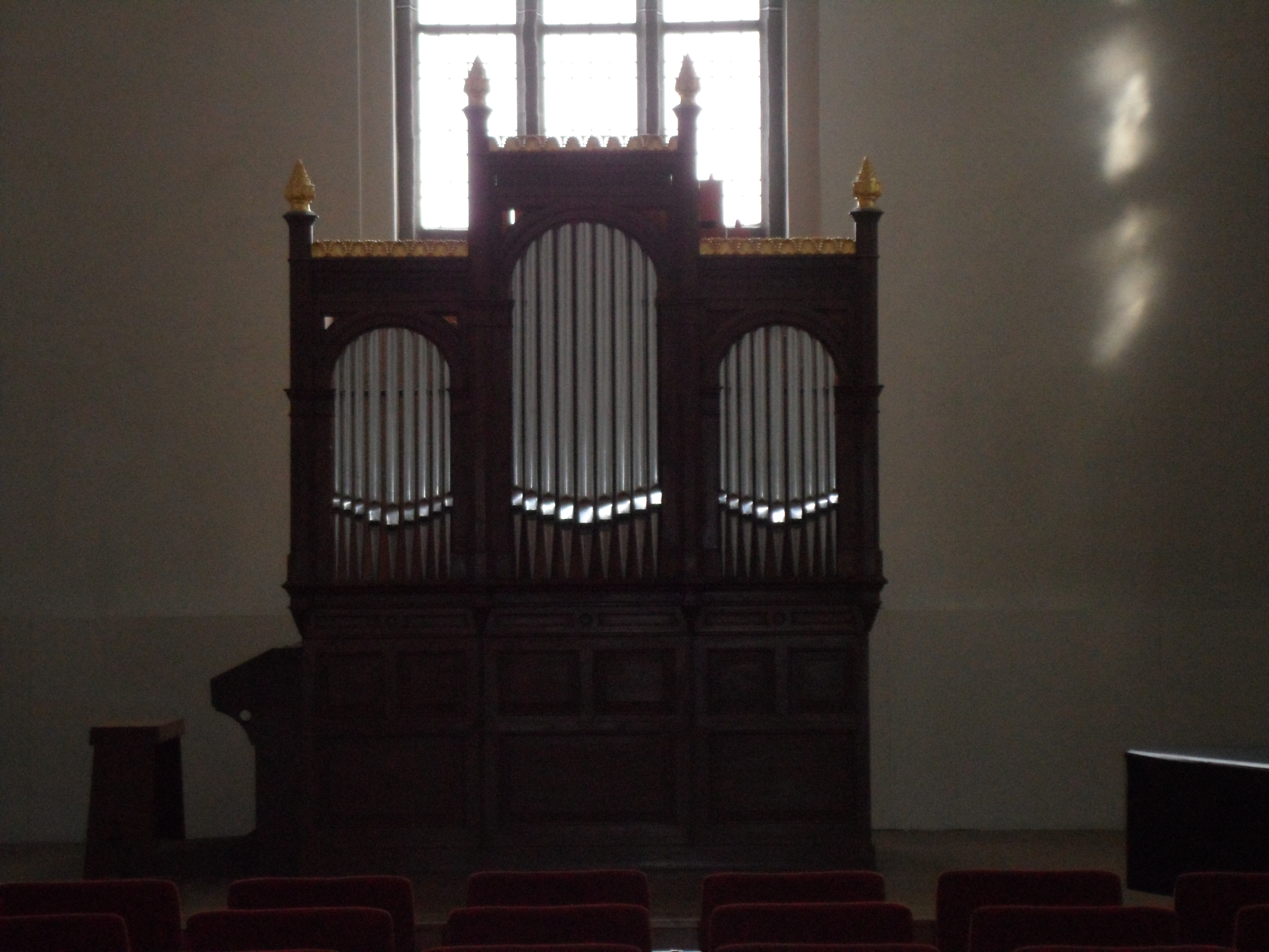 eine der ältesten erhaltenen Kleinorgel aus der Originalwerkstatt Sauers von 1866